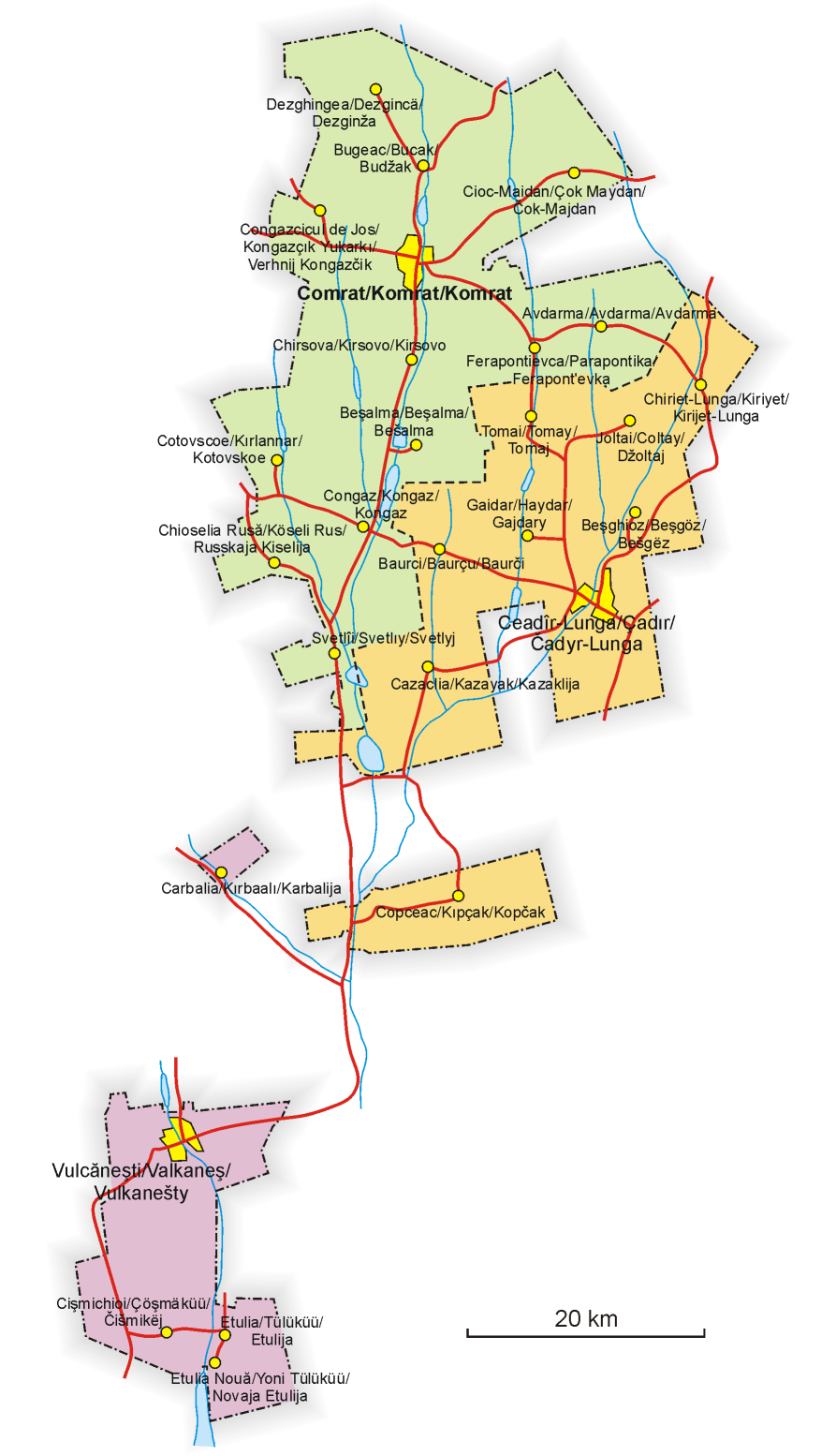 Map of Gagauzia